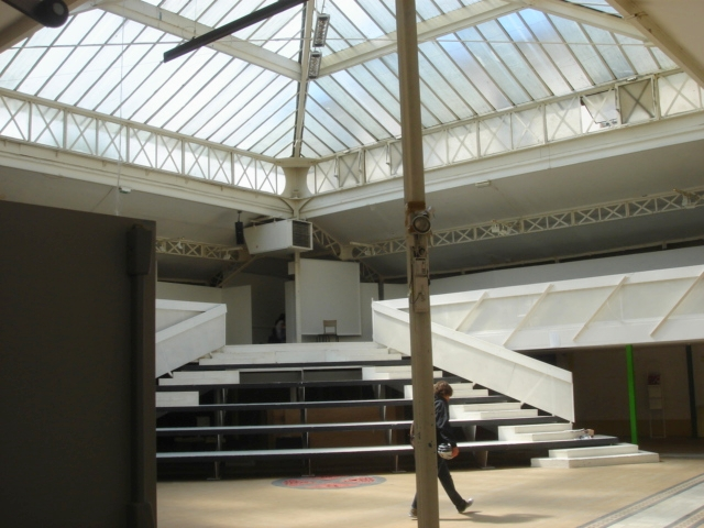 Jardin de l'Ecole Spéciale d'Architecture à Paris en France, avec au fond l'École Camondo.